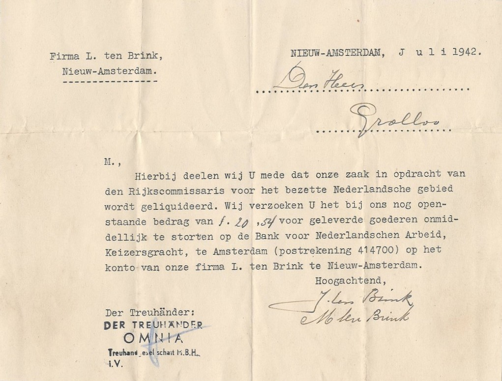 Brief van de Treuhand "OMNIA" in naam van de firma "L. ten Brink & Co", manufacturen-, confectie- en modemagazijn te Nieuw-Amsterdam, nog medegetekend door de eigenaren, met de mededeling dat de zaak geliquideerd wordt en een openstaande schuld moest worden gestort op een rekeningnummer van de Bank voor Nederlandschen Arbeid te Amsterdam.